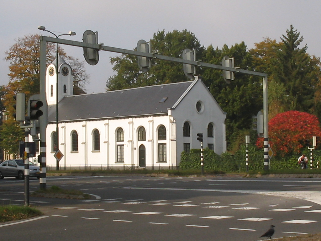 kapel langs N237 bij Zeist